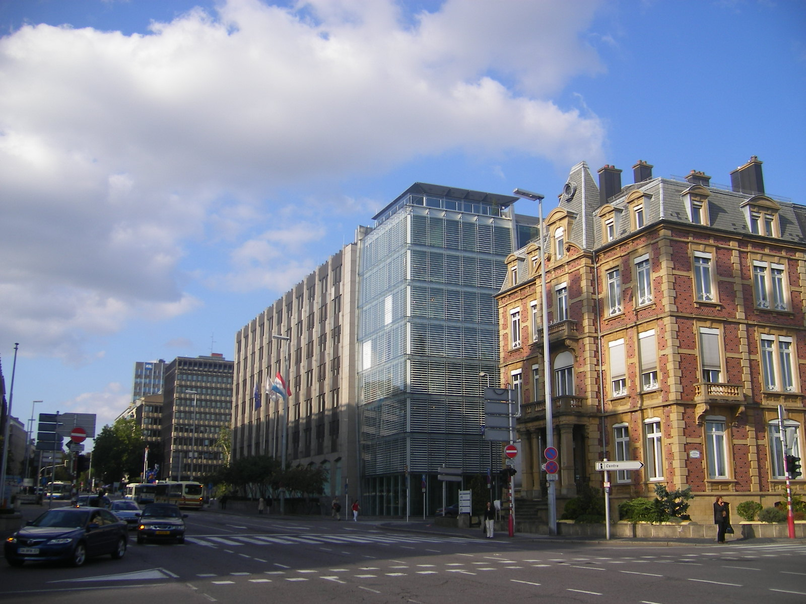 Luxembourg city